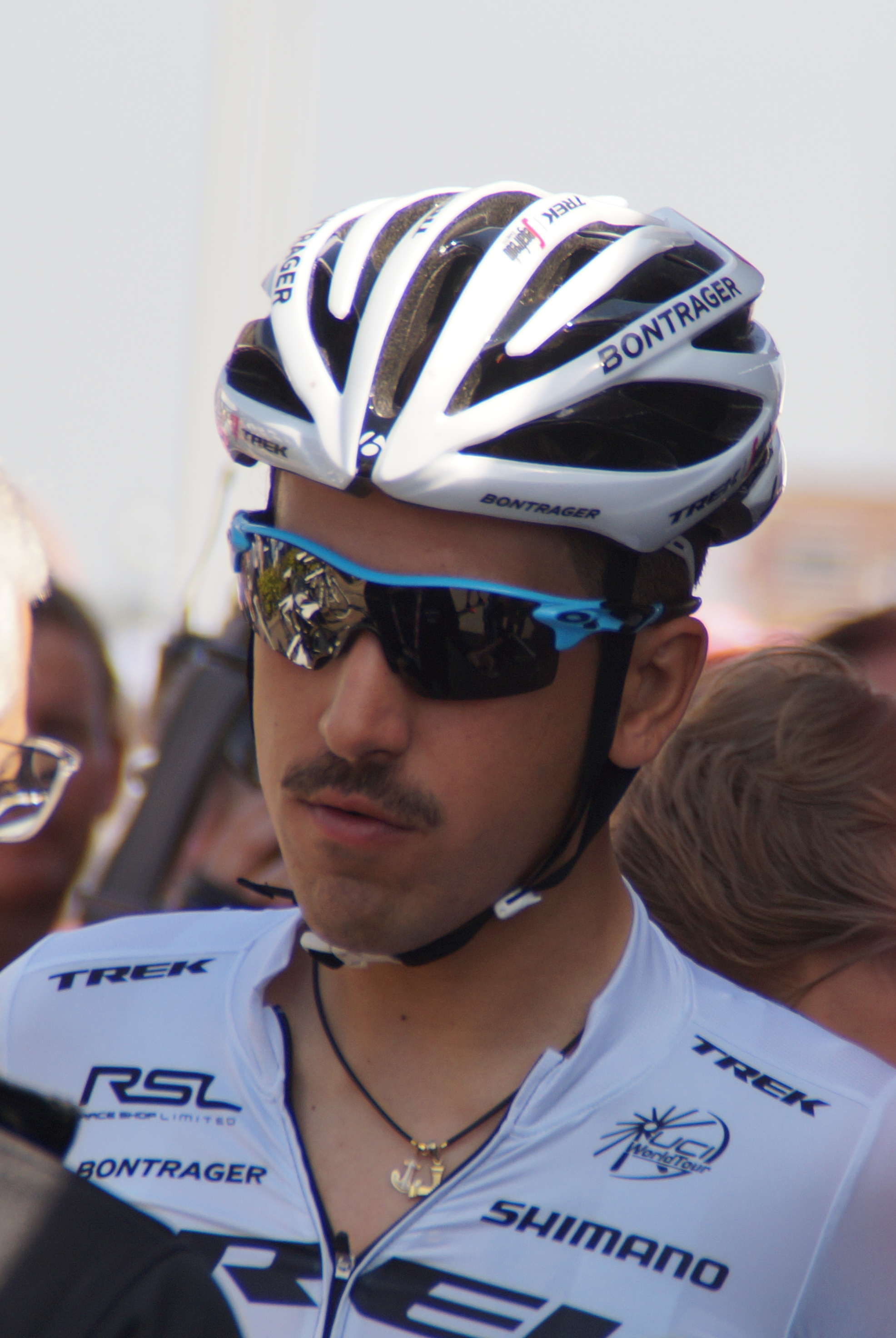 eugenio alafaci